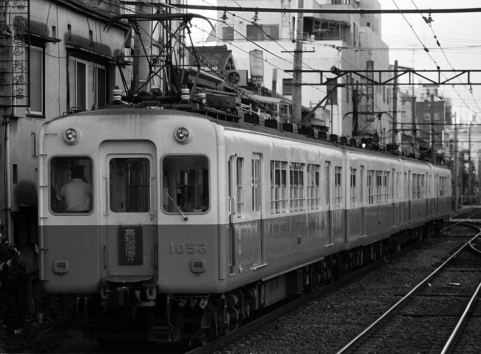 高松琴平電鉄 1053+1054+1062+1061